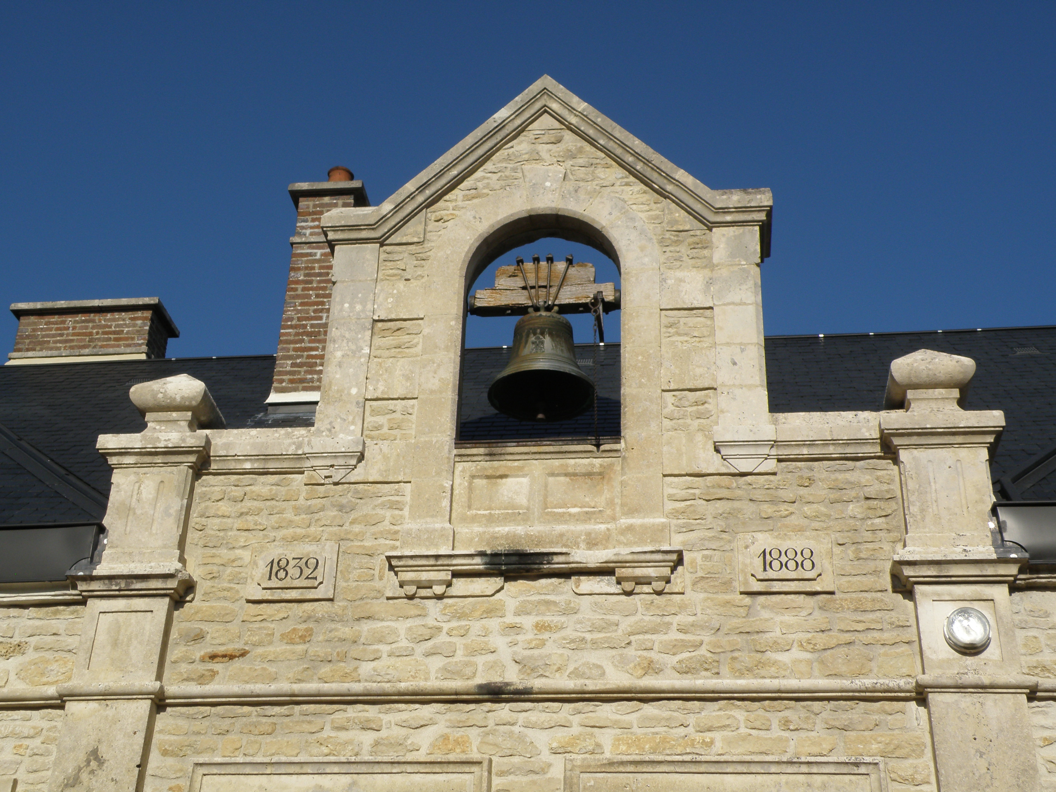 Mairie-Ecole. 10340 Avirey-Lingey